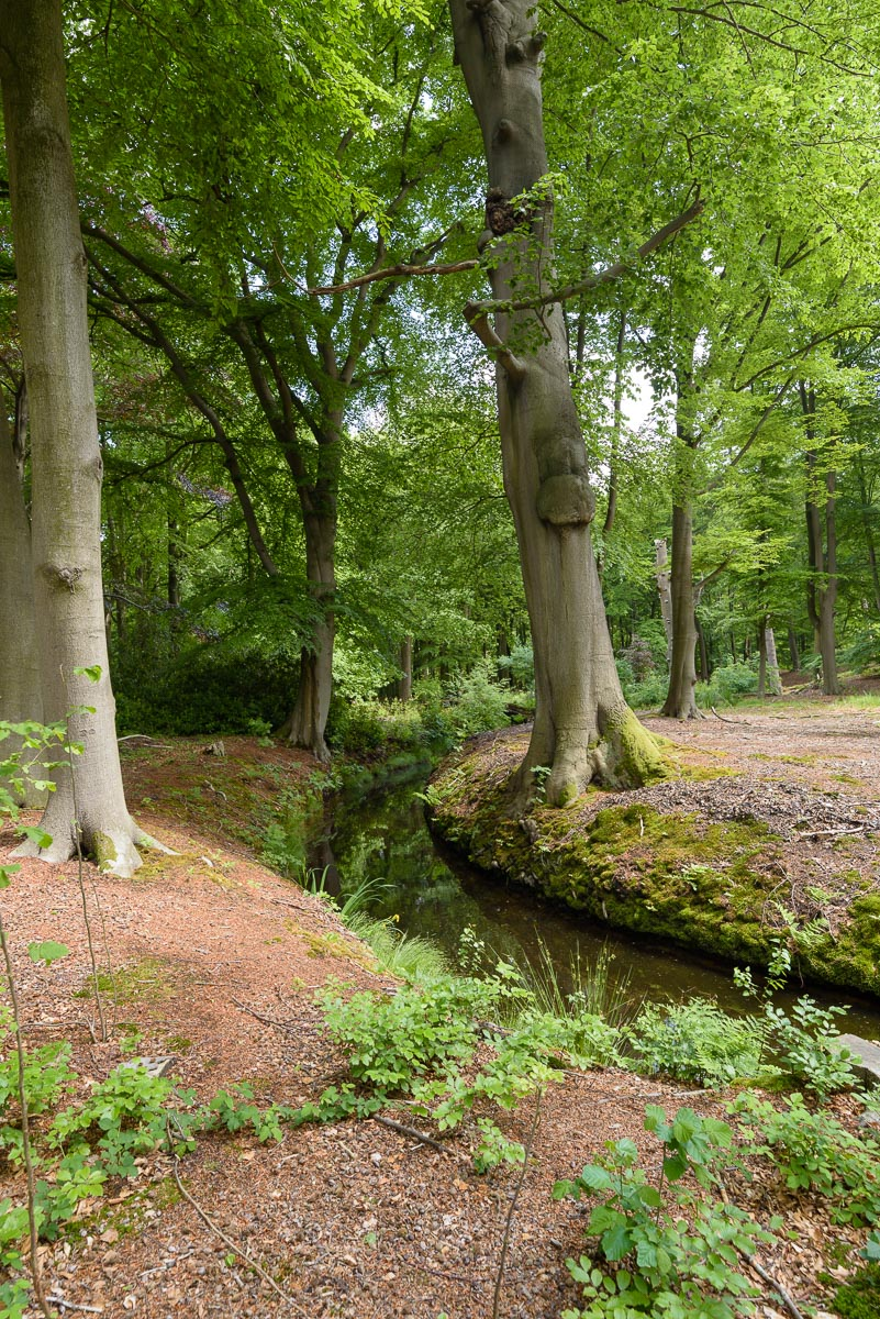 Landgoed Bantam, de herstelde slingerbeek. Hilversum/Wijdemeren, Noord Holland, Nederland.